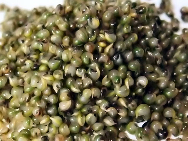 食品として加工されたja:ホウキギの種子（とんぶり）。投稿者本人による撮影。 Category:秋田県の画像 Category:野菜画像